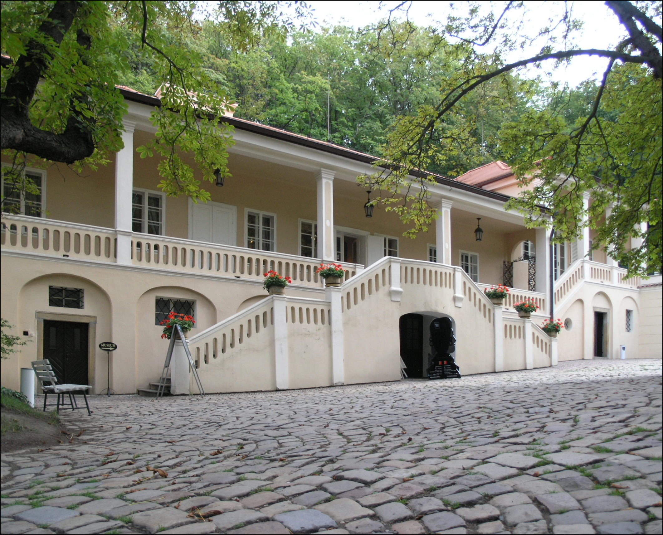 Vila Bertramka